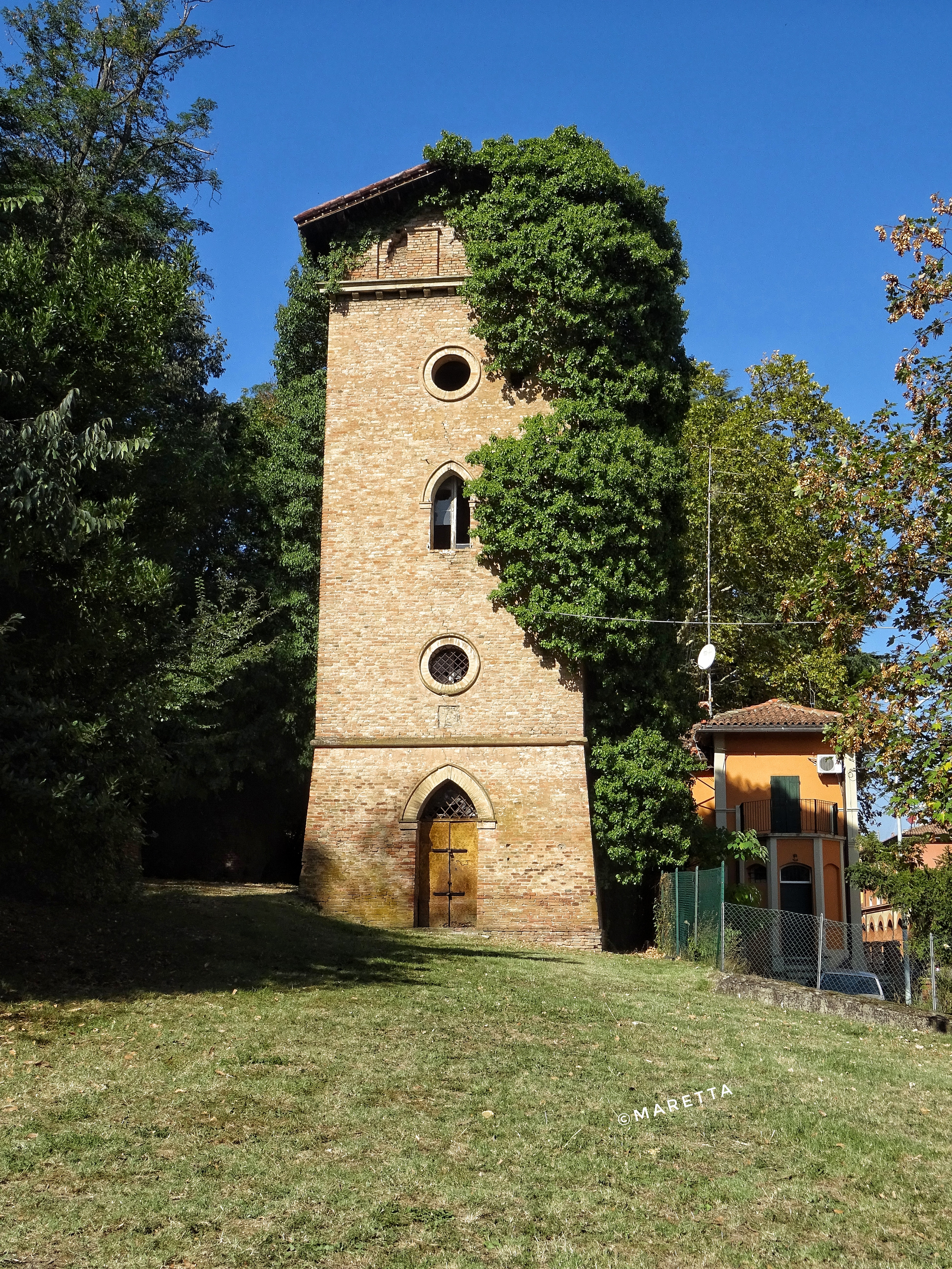 Torretta neomedievale di Villa Spada, Bologna This is a photo of a monument which is part of cultural heritage of Italy.